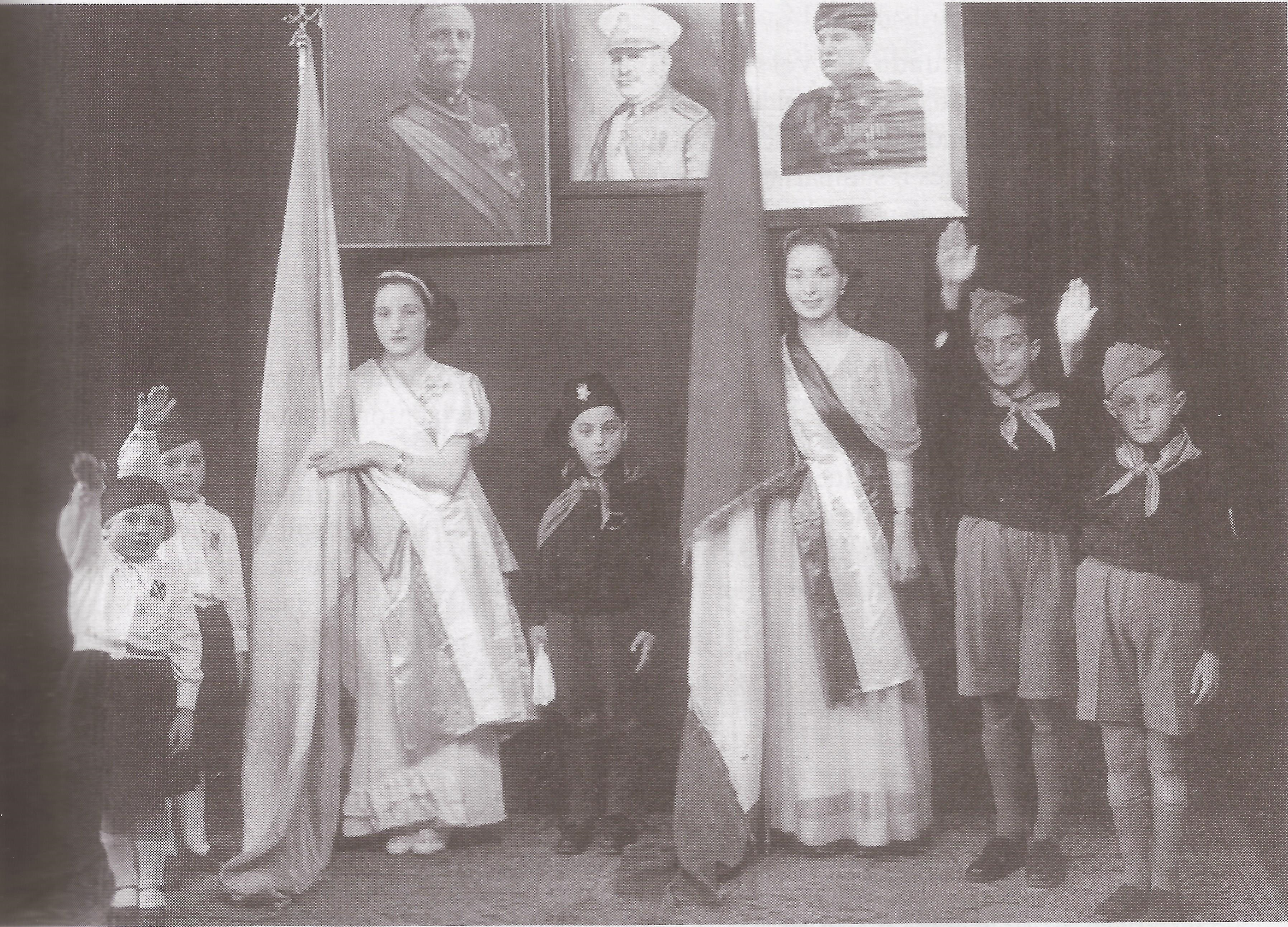 Conmemoración en Comodoro Rivadavia, Chubut, Patagonia, Argentina de la marcha en Roma tras la victoria de la batatta de Vittorio Veneto, octubre de 1936.